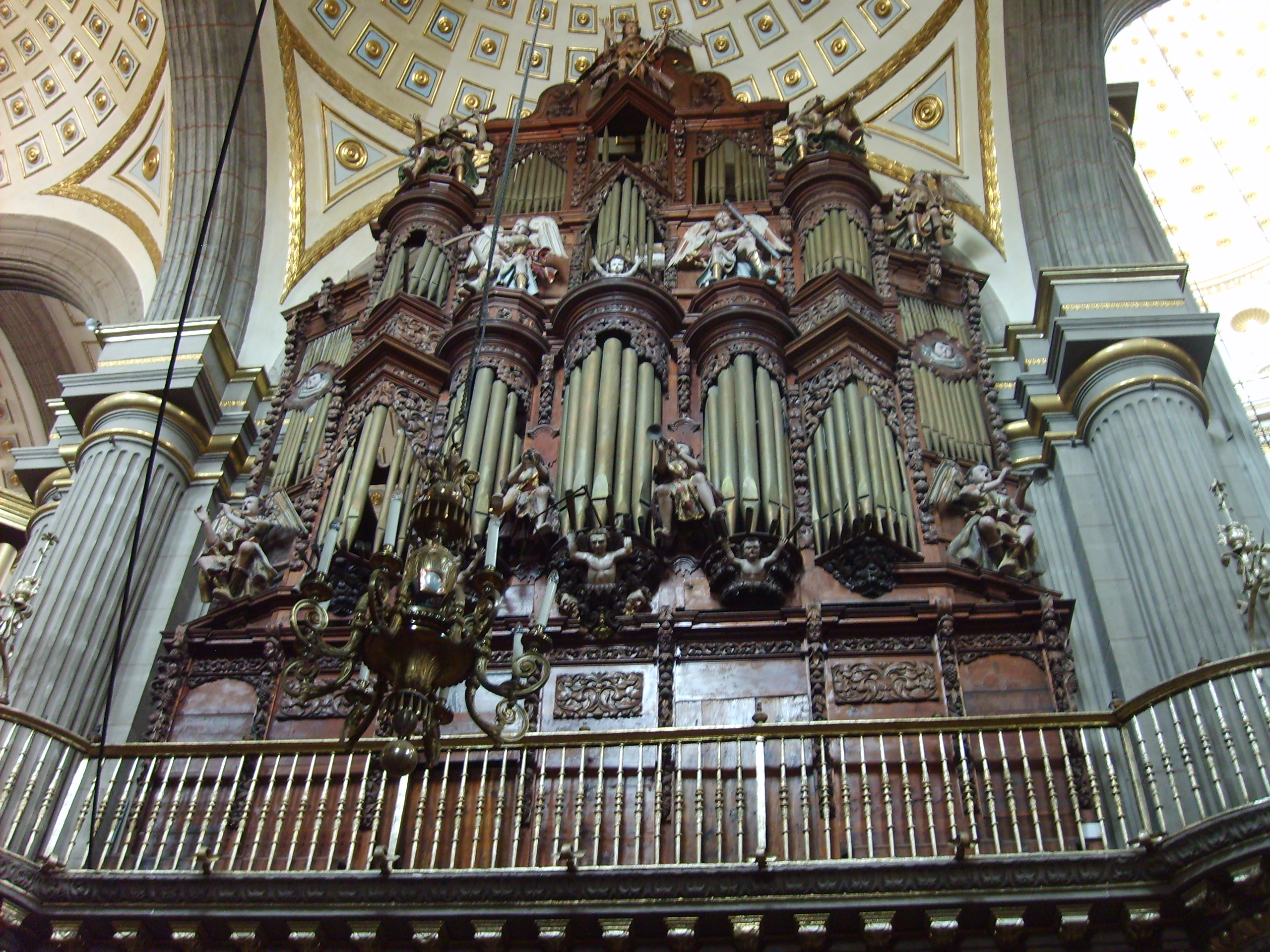 El segundo órgano de la Catedral de Puebla.